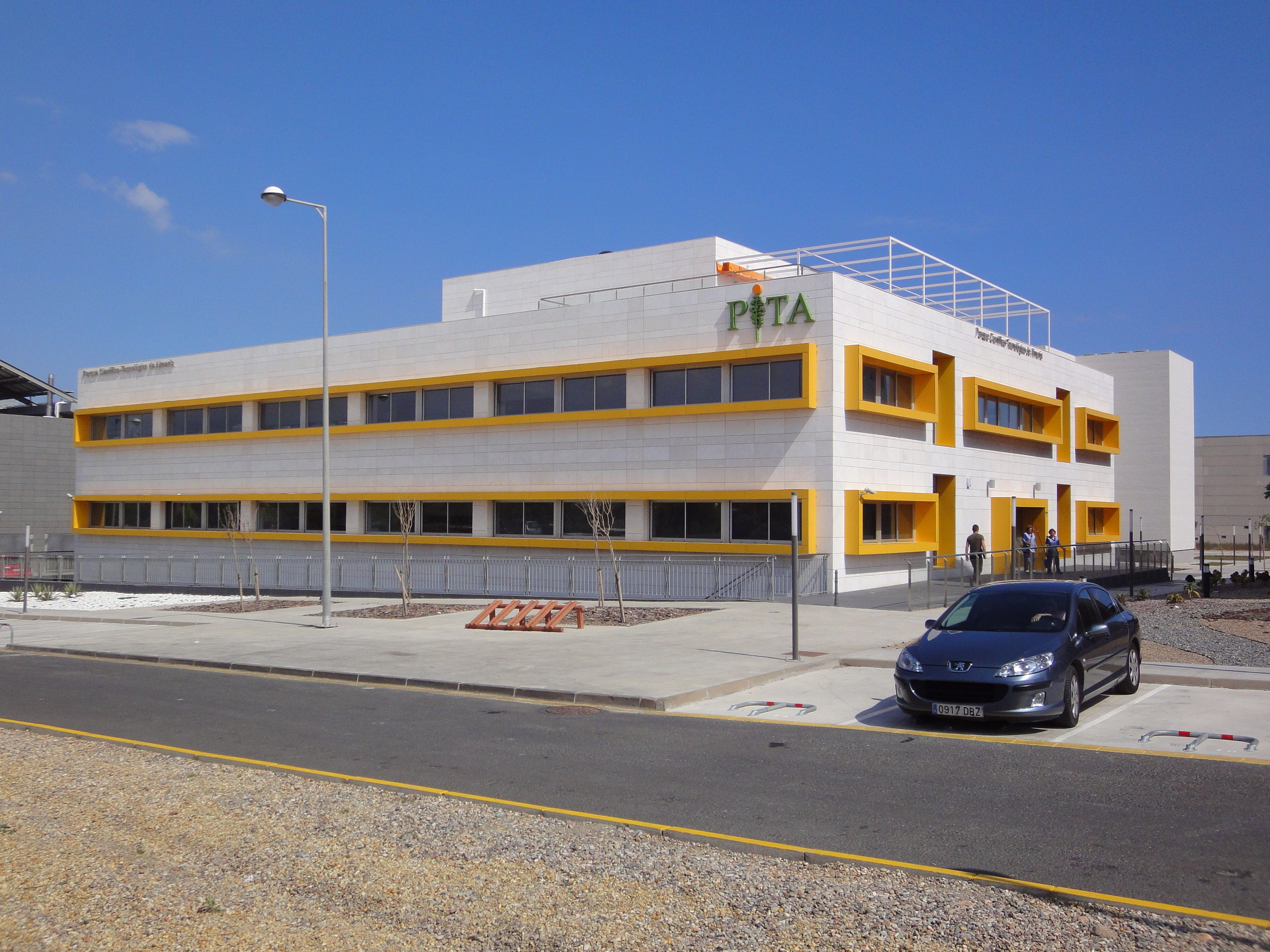 Fachada de la Sede Científica Parque Científico-Tecnológico de Almería (PITA) e